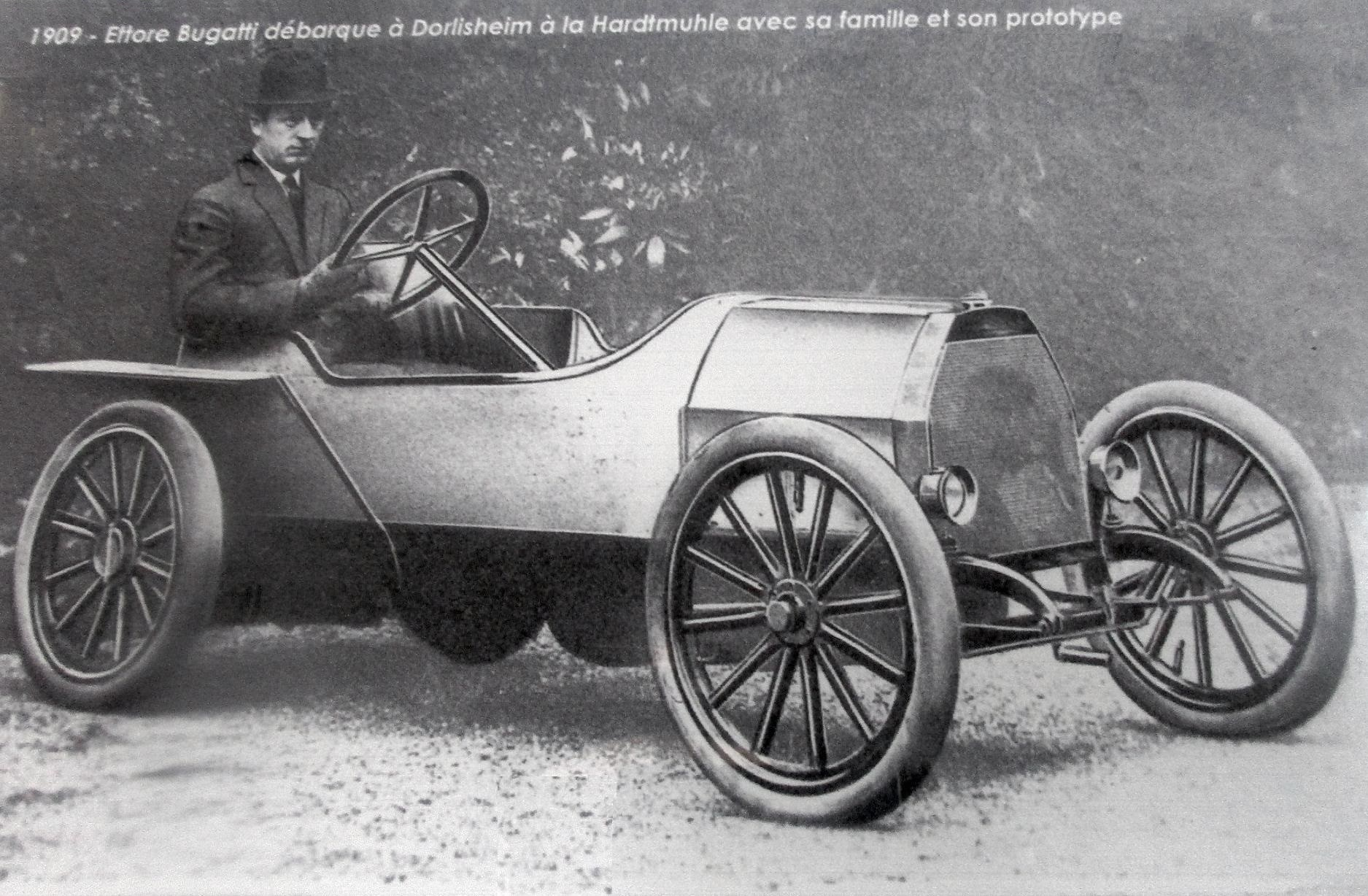 Bugatti Type 10 de 1907, pilotée par Ettore Bugatti, au moment de la fondation de son Usine Bugatti de Molsheim en 1909